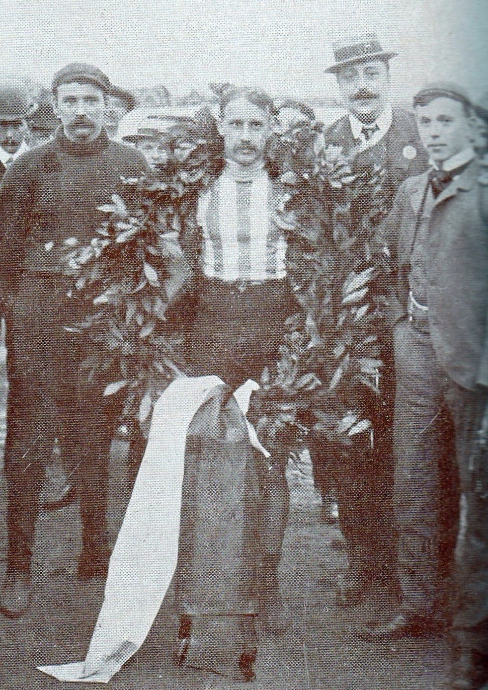 Piet Dickentman, niederländischer Radrennfahrer, als Steher-Weltmeister über 100 Kilometer 1903